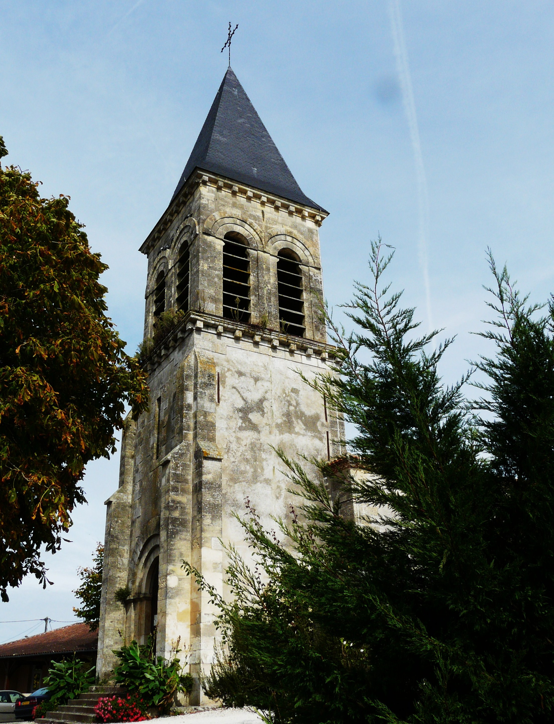 Église Saint-Barthélemy, Saint-Barthélemy-de-Bellegarde, Dordogne, France